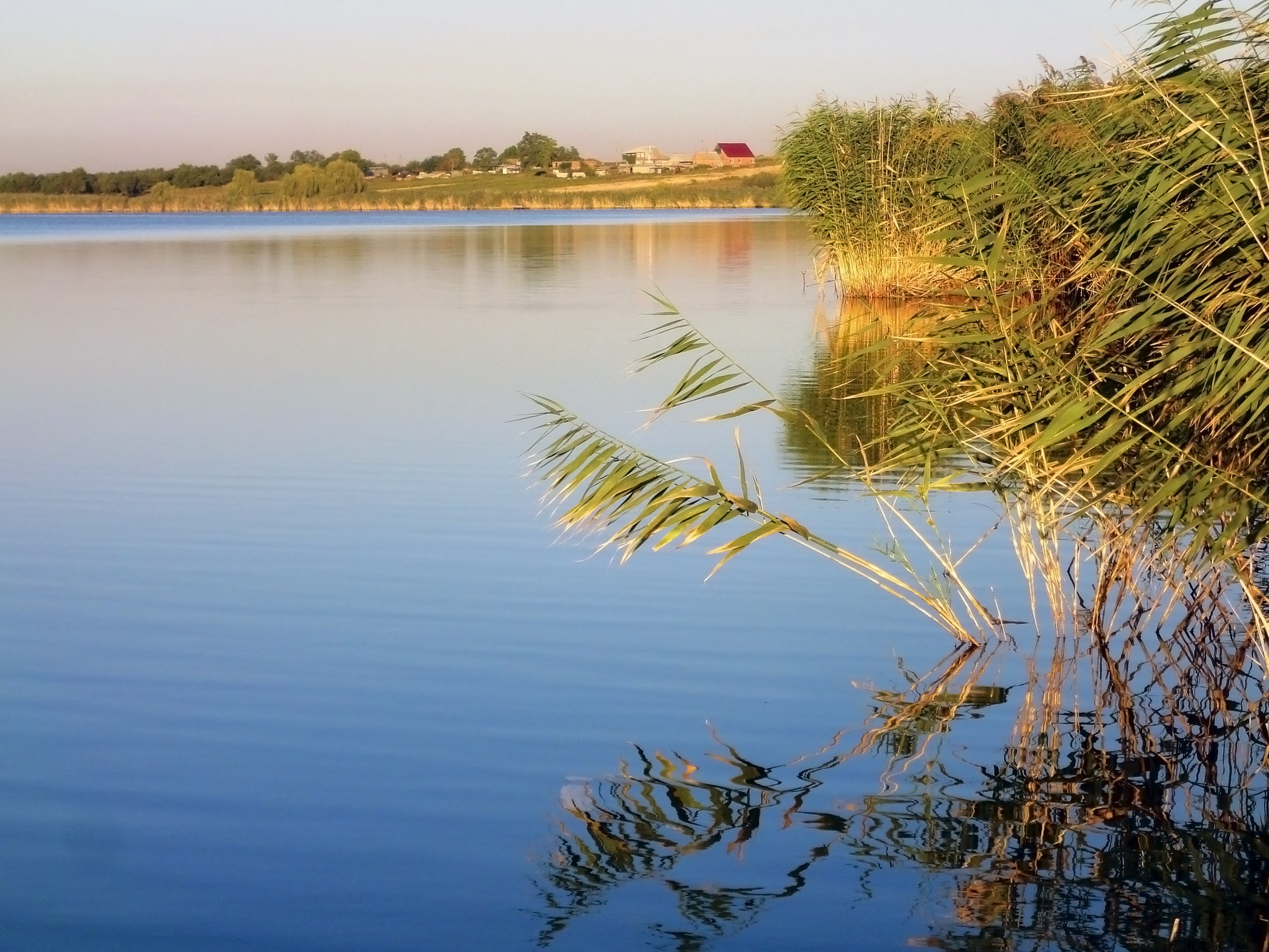 Река Ясени в районе пос. Заводской